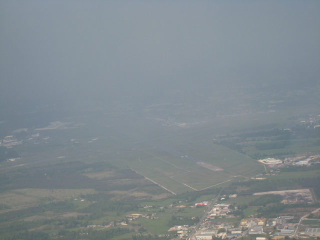 Le terrain de Bordeaux Merignac en train de se couvrir.